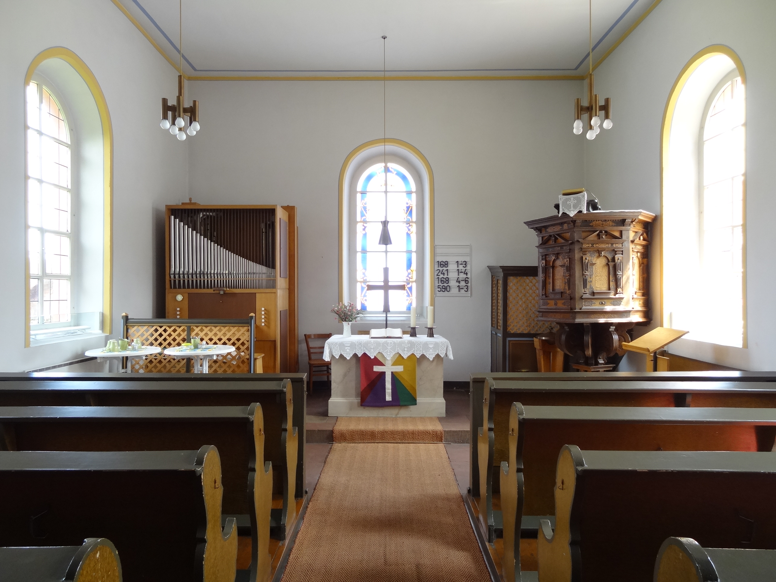 Evangelische Kirche (Hausen-Oes)